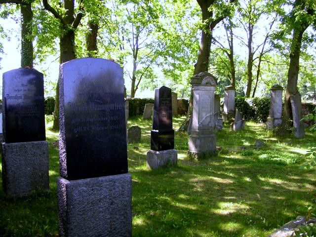 Jüdischer Friedhof in Groß Neuendorf, Brandenburg (Oderbruch)